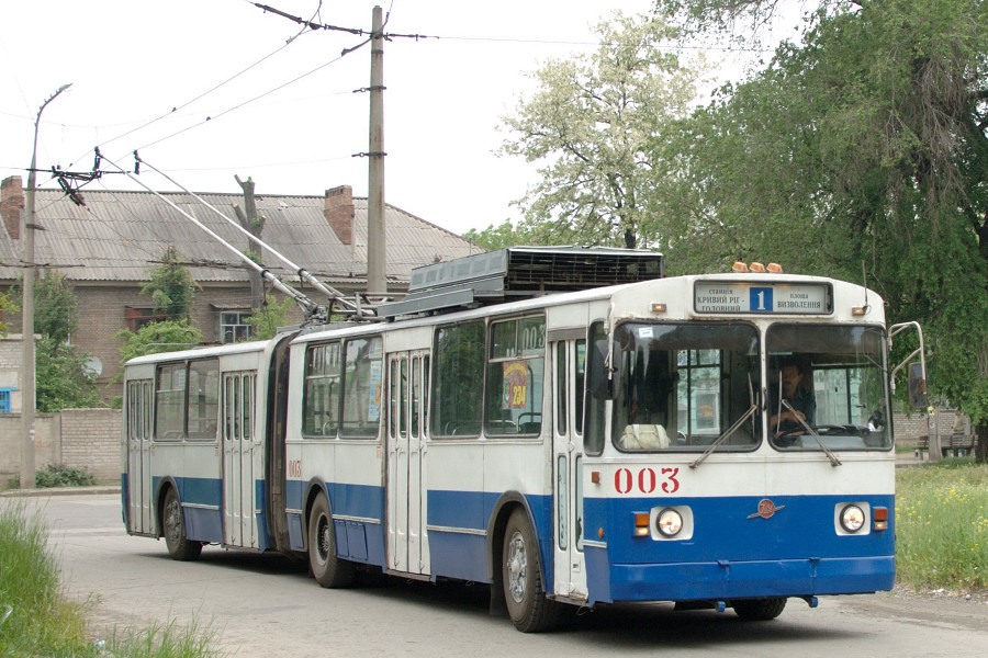 ZiU-10 003 in Krywyj Ryh